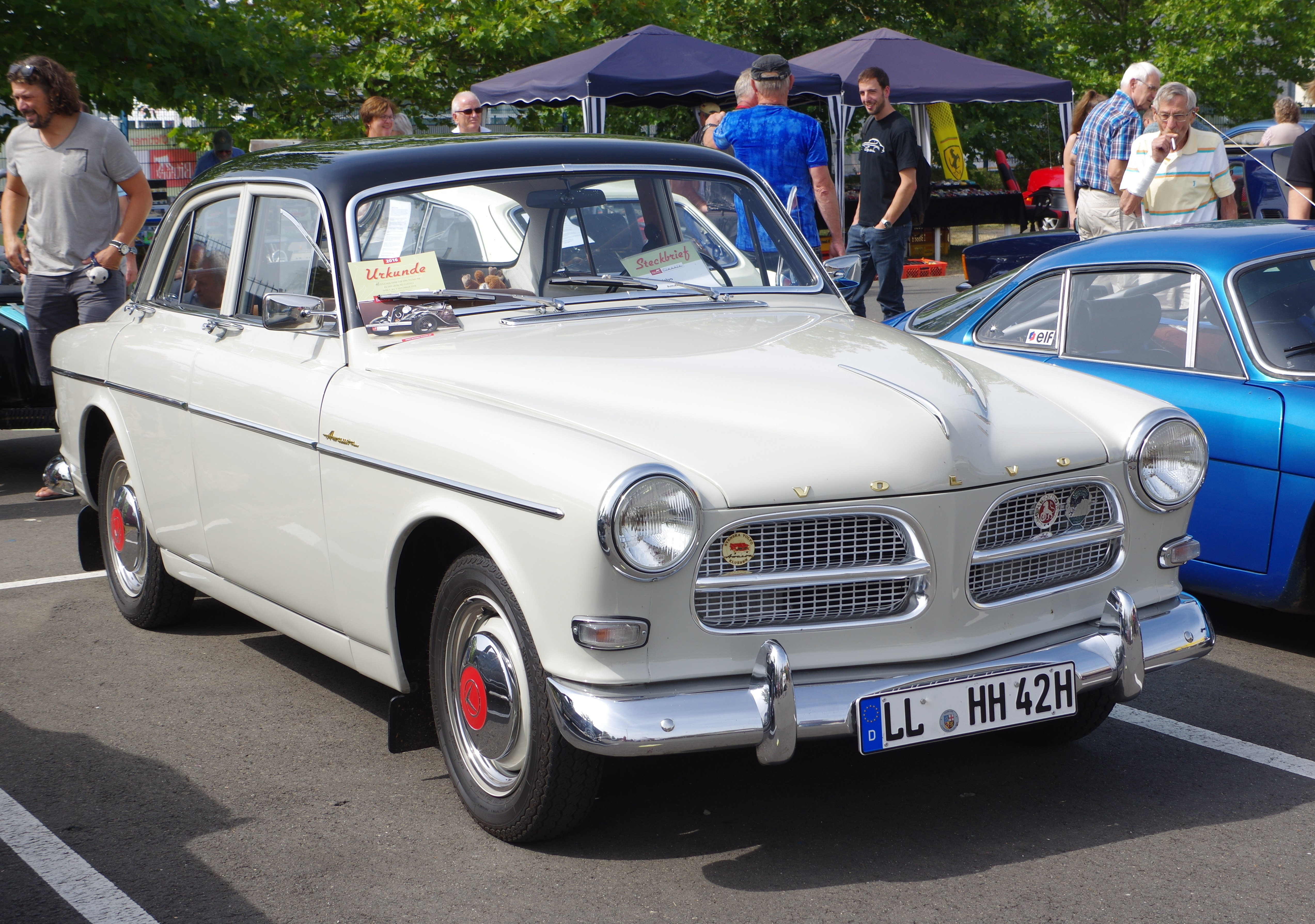 Volvo Amazon, 1960, 1600cm³, 4 Zyl., 60 PS , Bitburg Classic 2016, Das Nummernschild ist verfälscht!